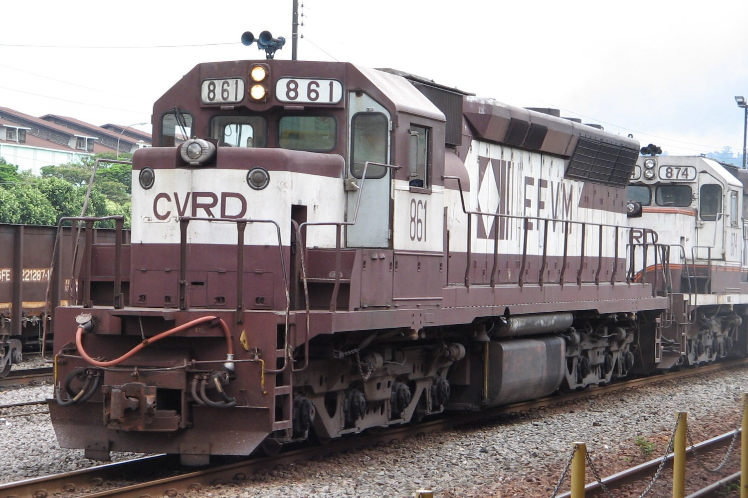 EFVM nº861 DDM45 - Estacão Intendente Câmara / Ipatinga-MG-Brasil